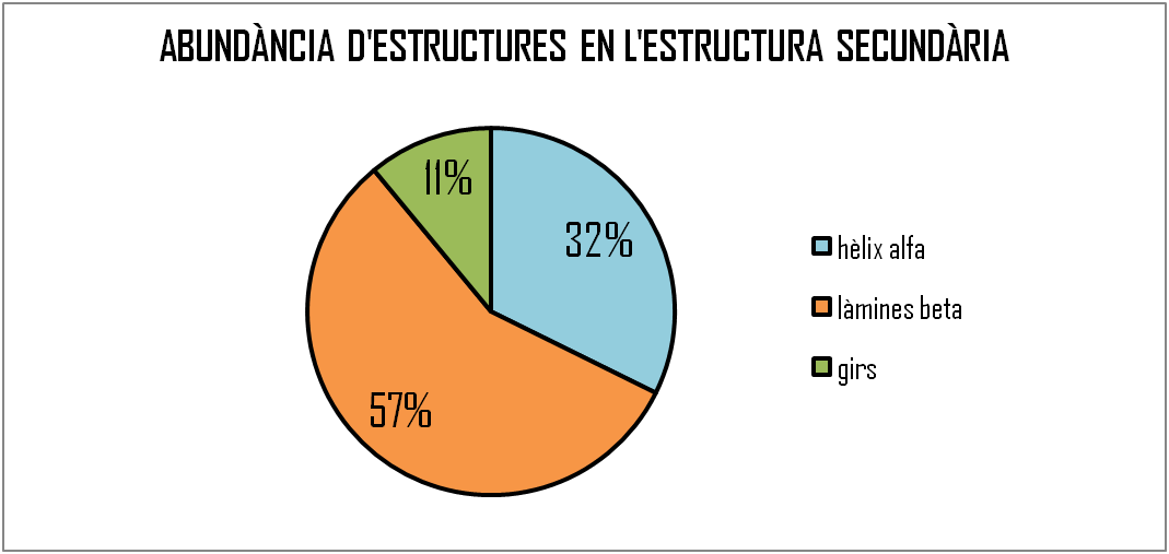 FreqAlfaBetaPNLIPRP2